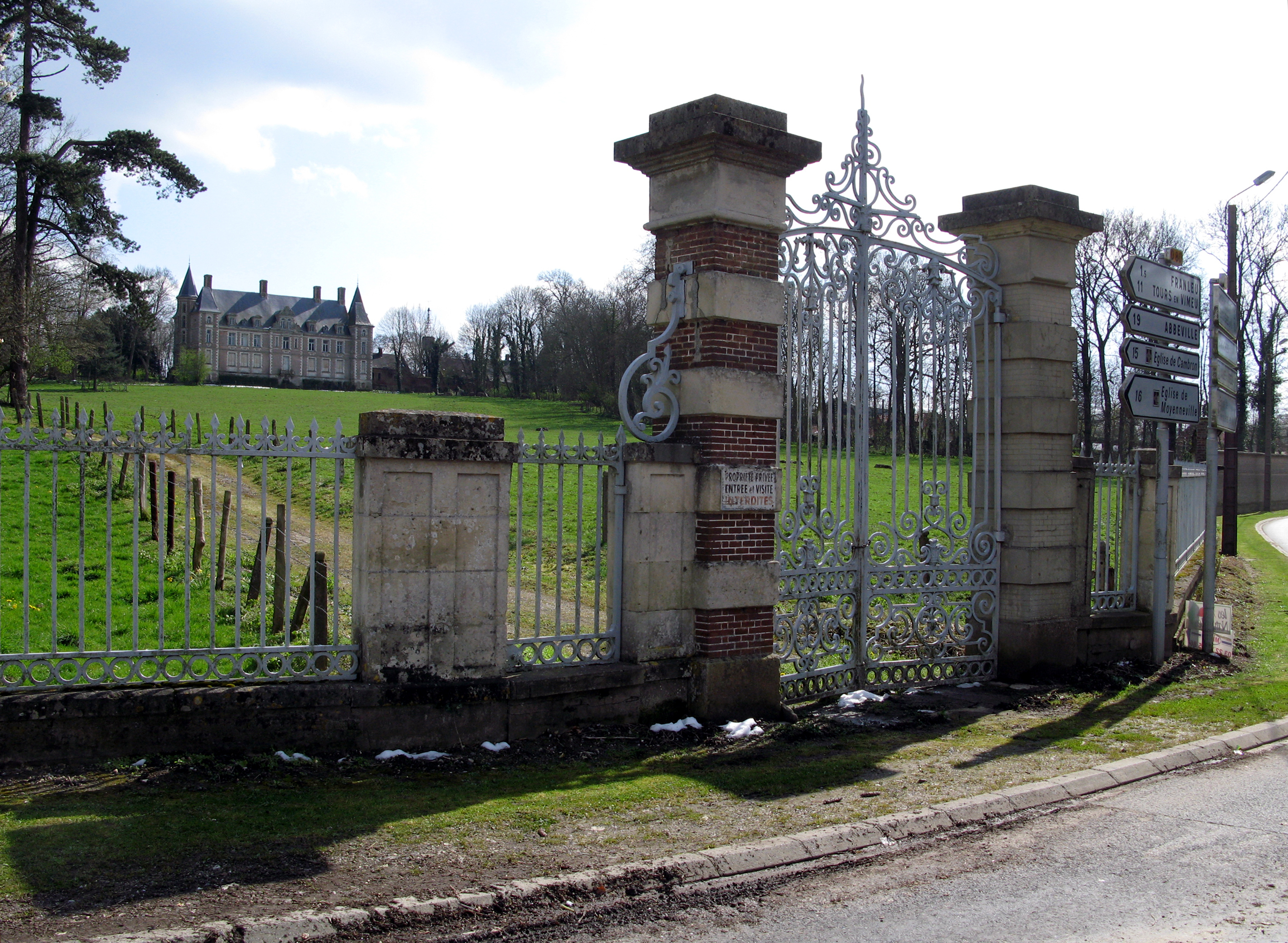 Arrest (Somme, France) - Le château.